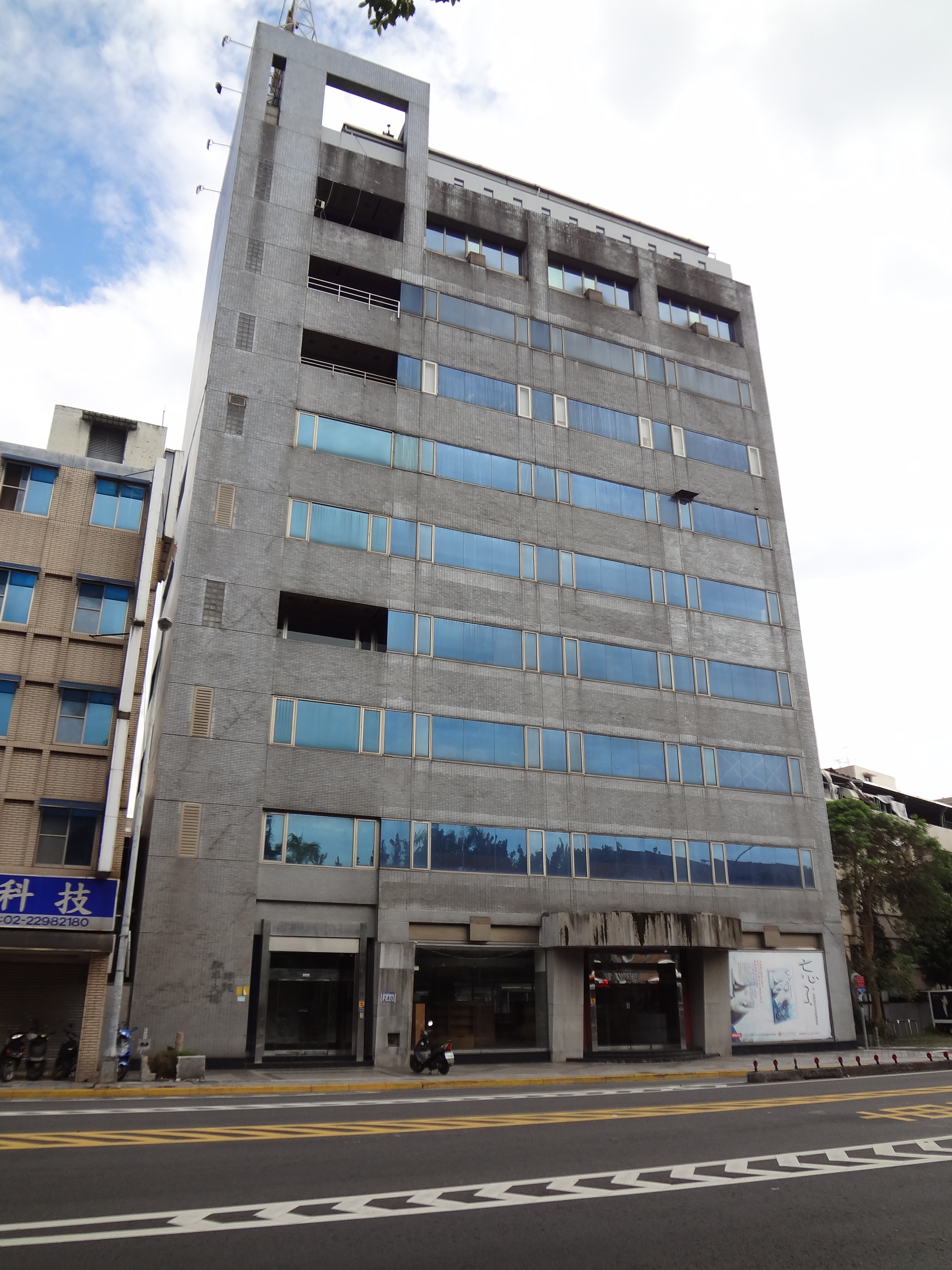 中文（台灣）: 中國時報和平大樓正面外觀。